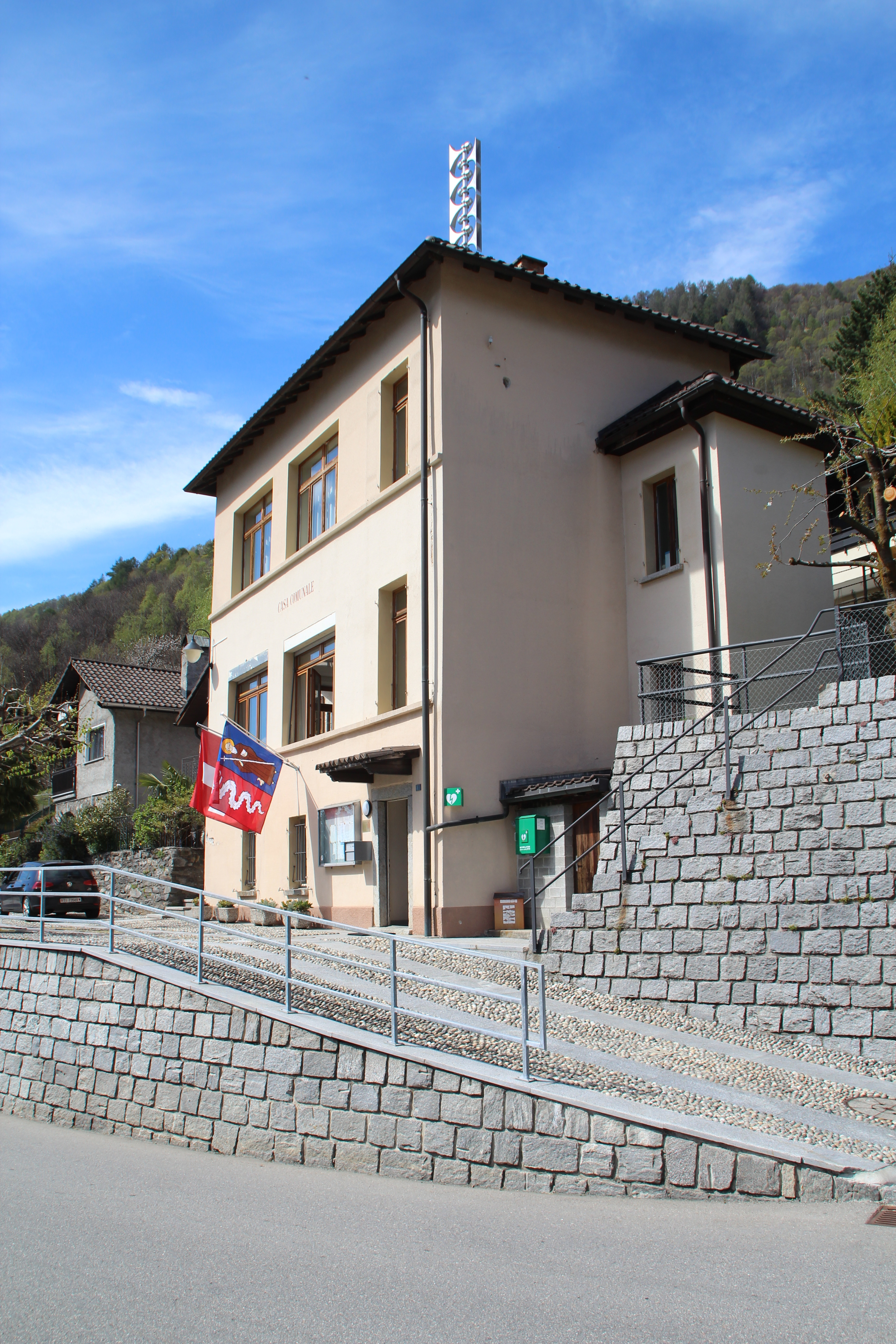 Gemeindehaus von Sant'Antonio TI